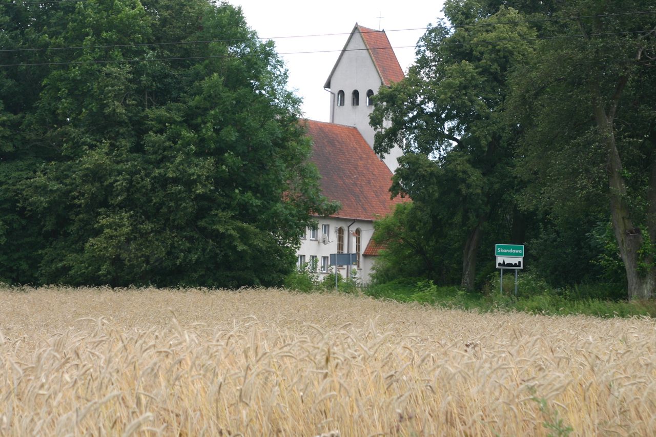 Skandawa (niem. Skandau) – wieś w Polsce położona w województwie warmińsko-mazurskim, w powiecie kętrzyńskim, w gminie Barciany.